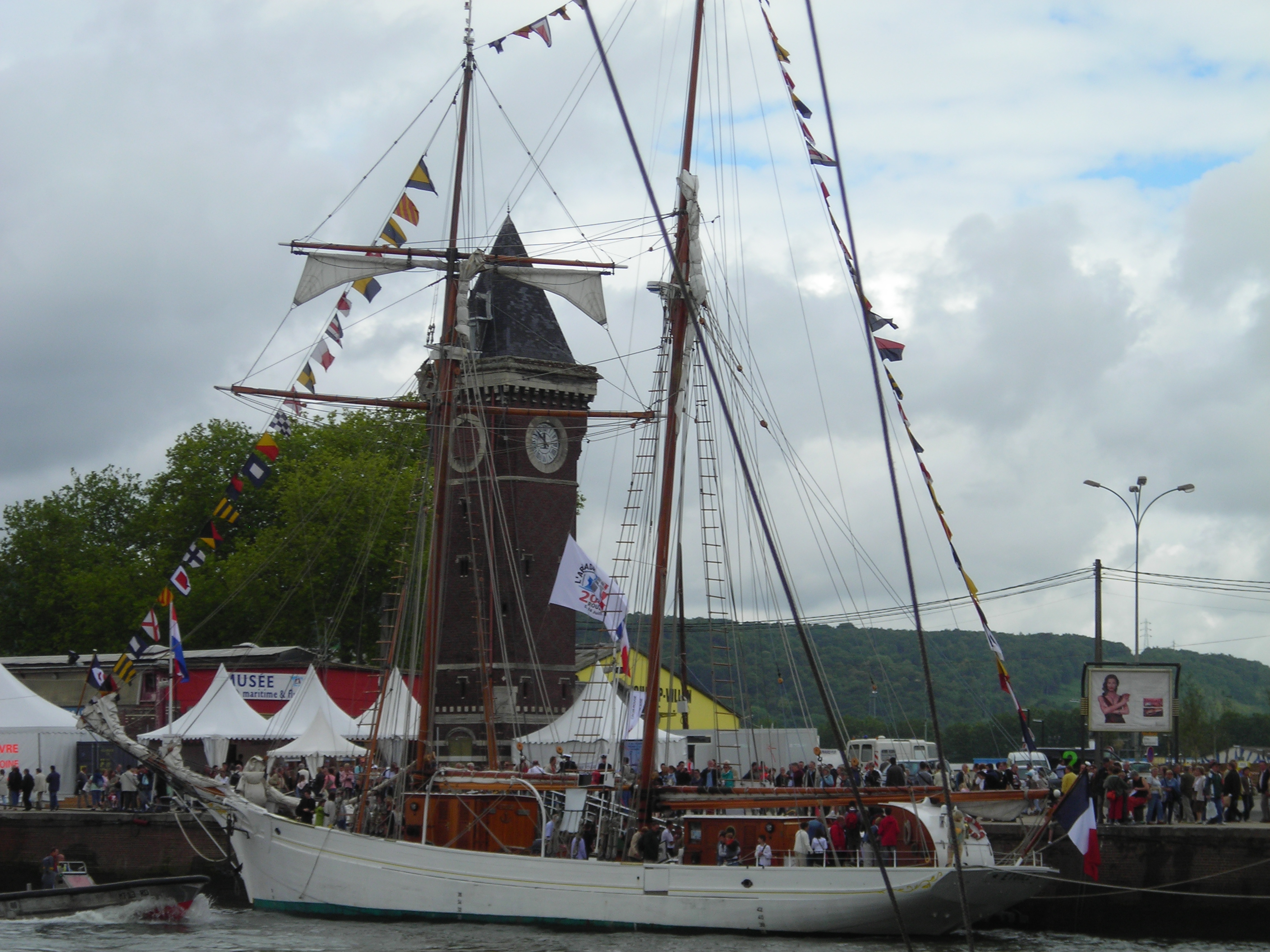 L'Etoile, navire de la Marine Nationale française